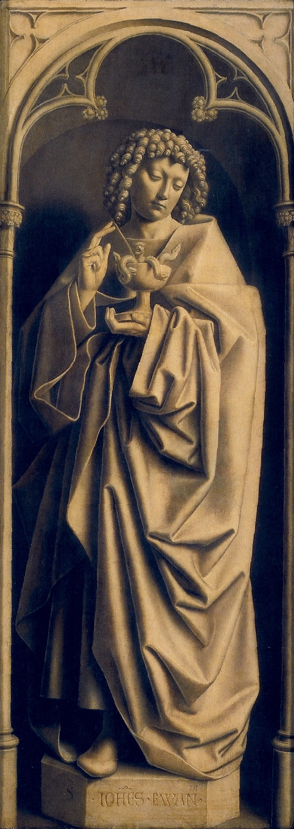 detail: John the Evangelist